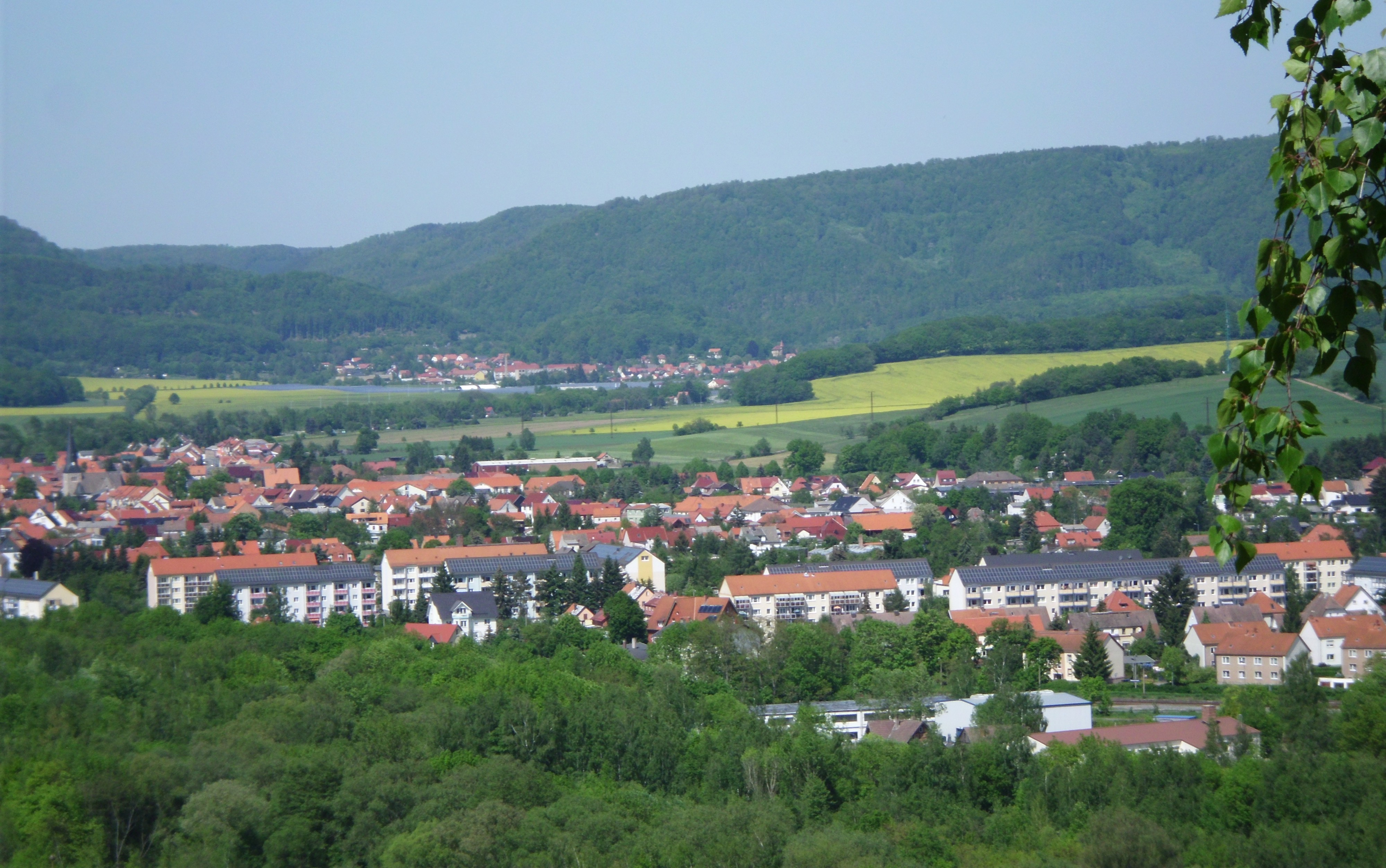 Blick vom Kohnstein auf Niedersachswerfen mit Ilfeld im Hintergrund, Gemeinde Harztor